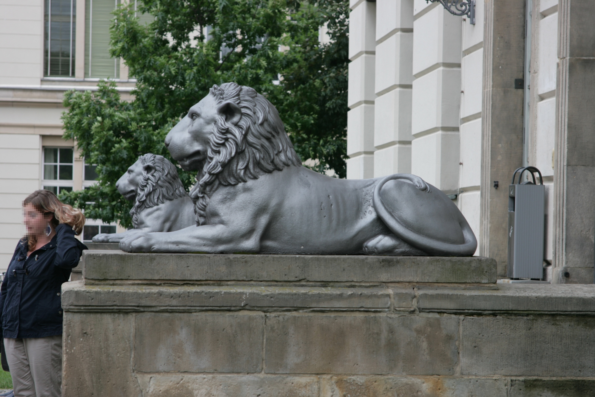 Johann Gottfried Schadow (1764–1850) Löwen 1816 Gusseisen, Überzug Halle, Universitätsplatz